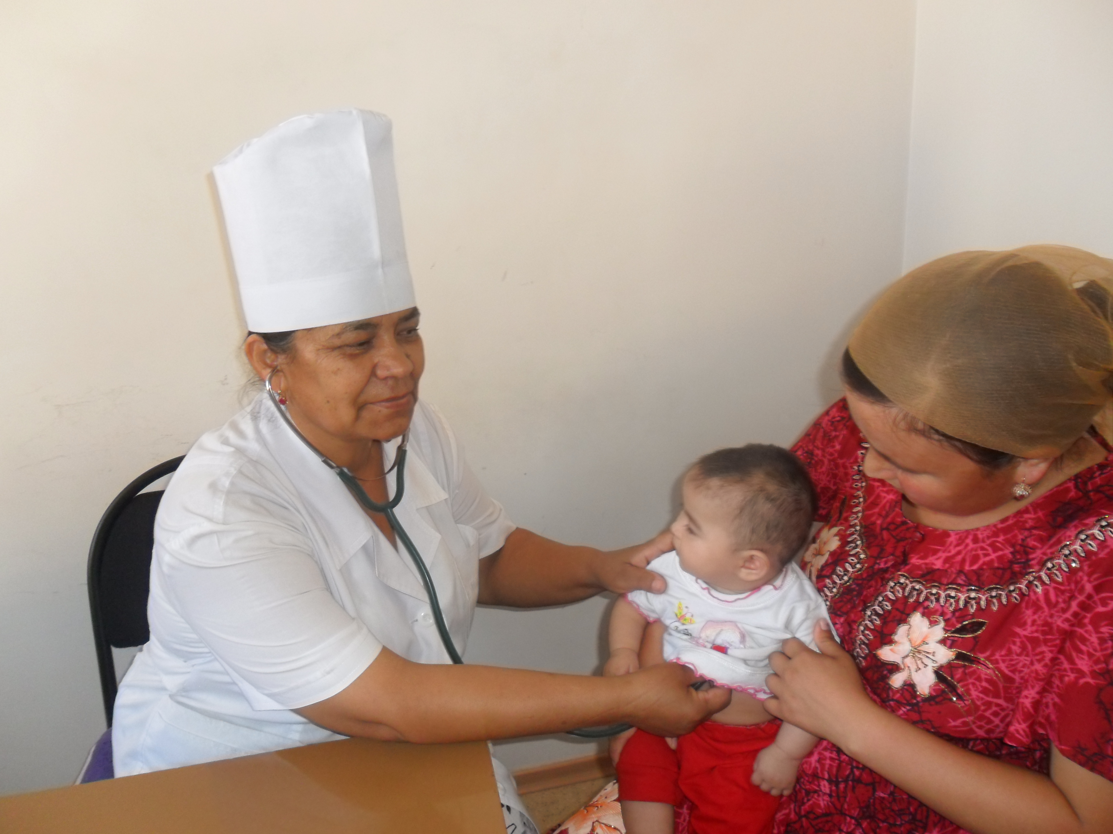 Oʻzbekcha/ўзбекча: Qorabuloq